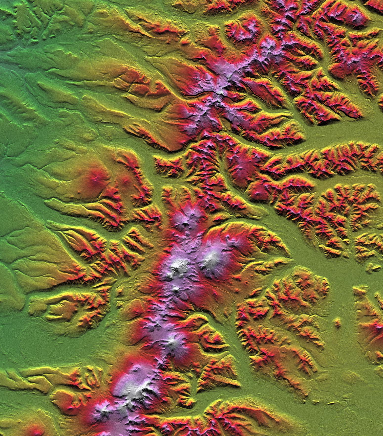 Sredinny Range, Kamchatka Peninsula